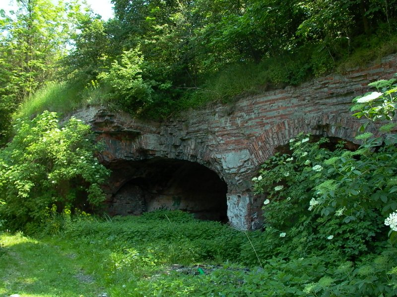 Fort Tsche (Piłsudskiego, Legionów Dąbrowskiego) w Warszawie, zrujnowane koszary szyjowe.